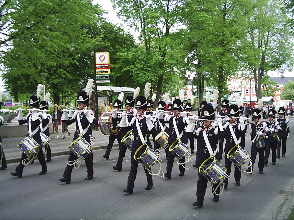 Arméns Trumkår på marsch i Jönköping 28 mars 2005 i samband med Svensk Blåsmusikfestival. Fotograf: Tubaist